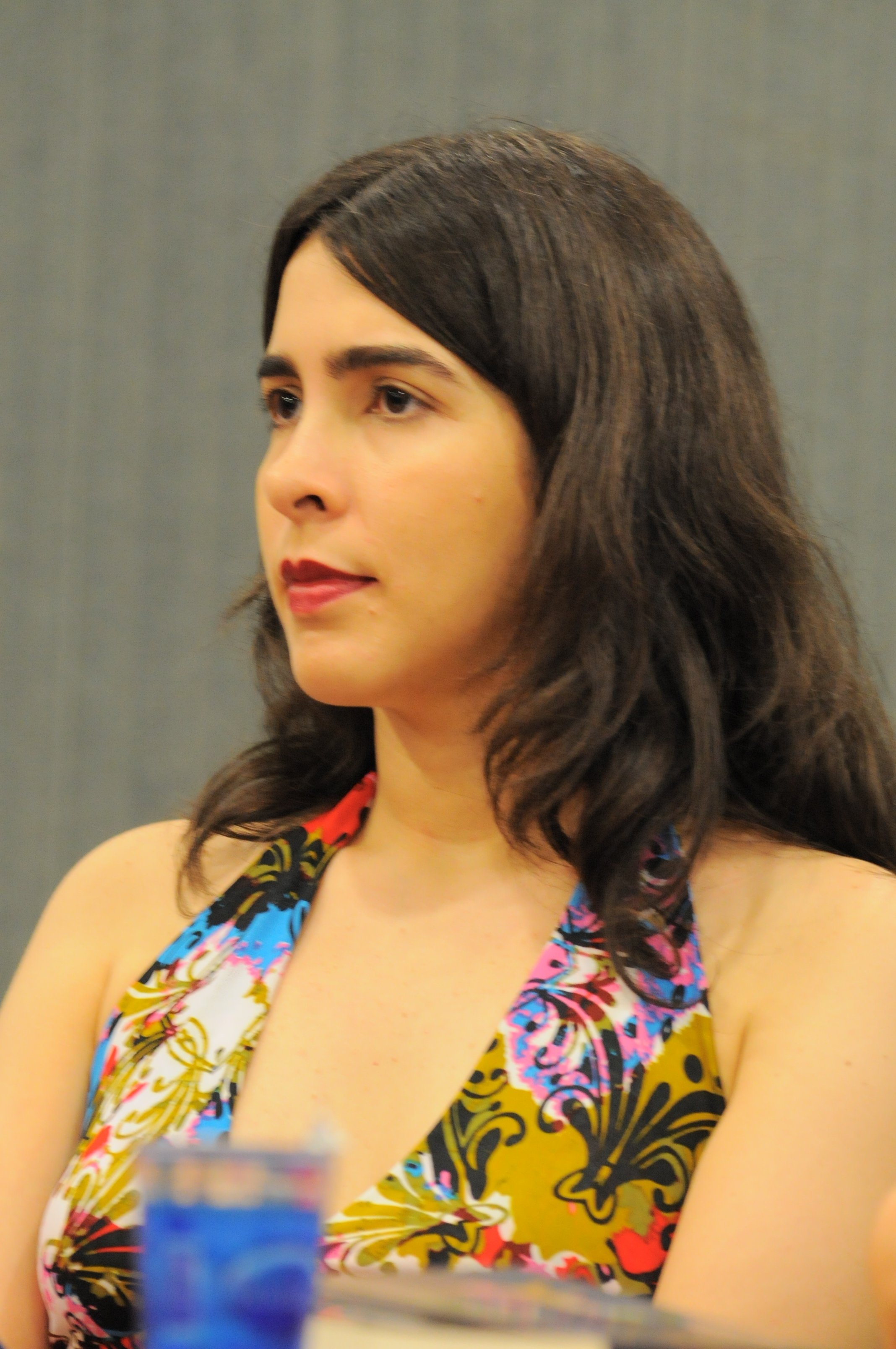 Foto de Tércia Montenegro na Bienal do Livro. by Sheila Oliveira.